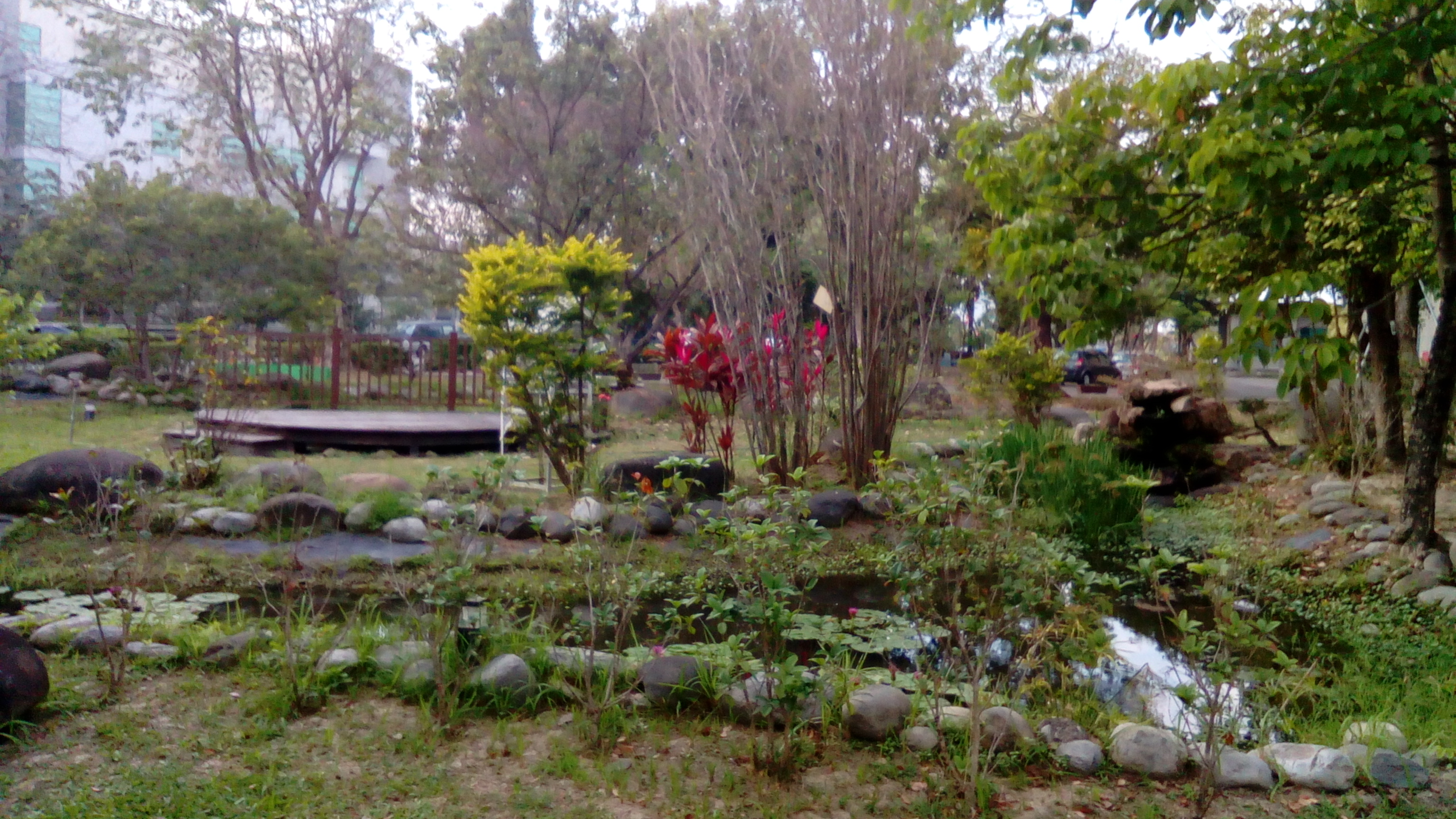 同上